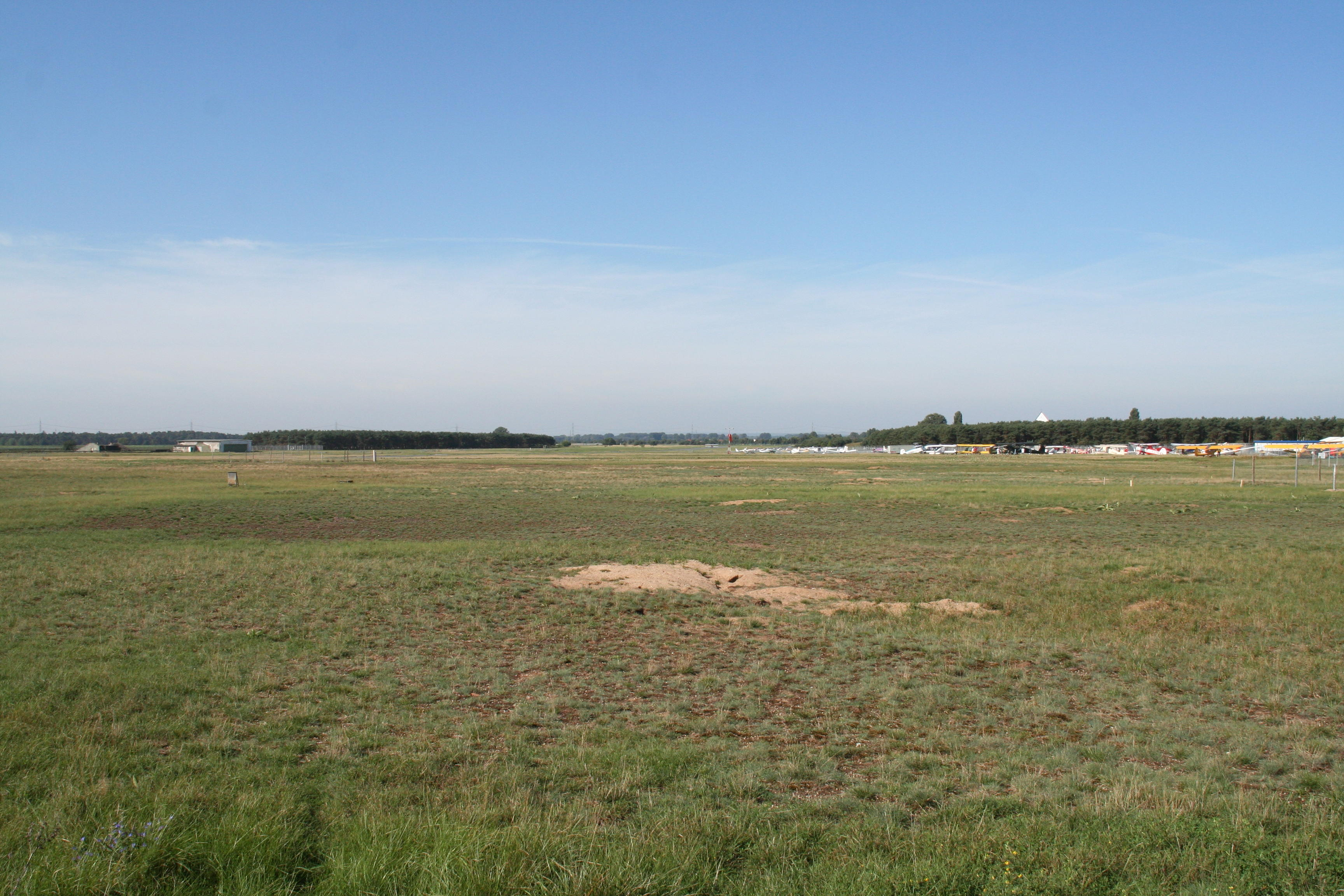 August-Euler-Flughafen Blickrichtung West